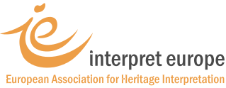 Interpret Europe Logo